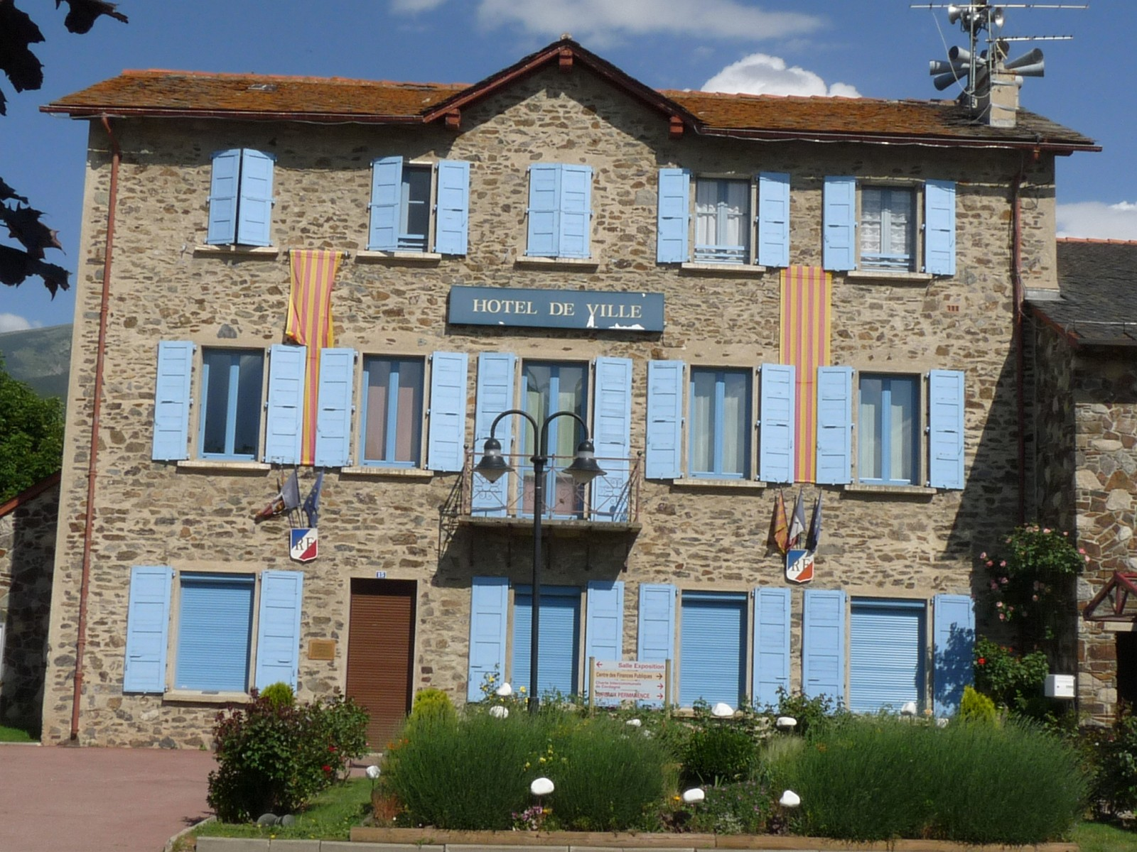 Mairie de Saillagouse, Pyrénées-Orientales, France